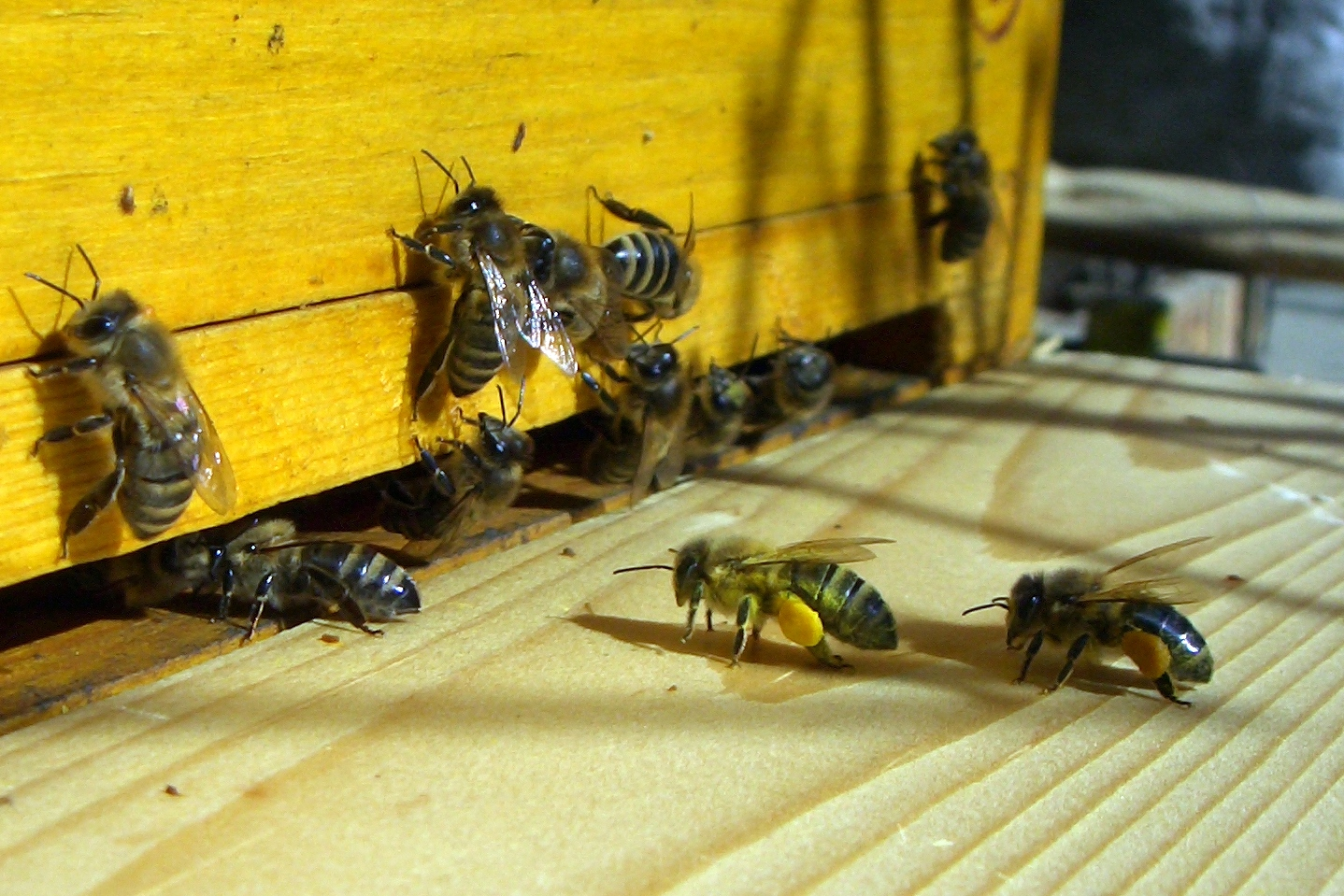 landing bees back at home with pollen / heimkehrende Bienen mit Pollen beladen